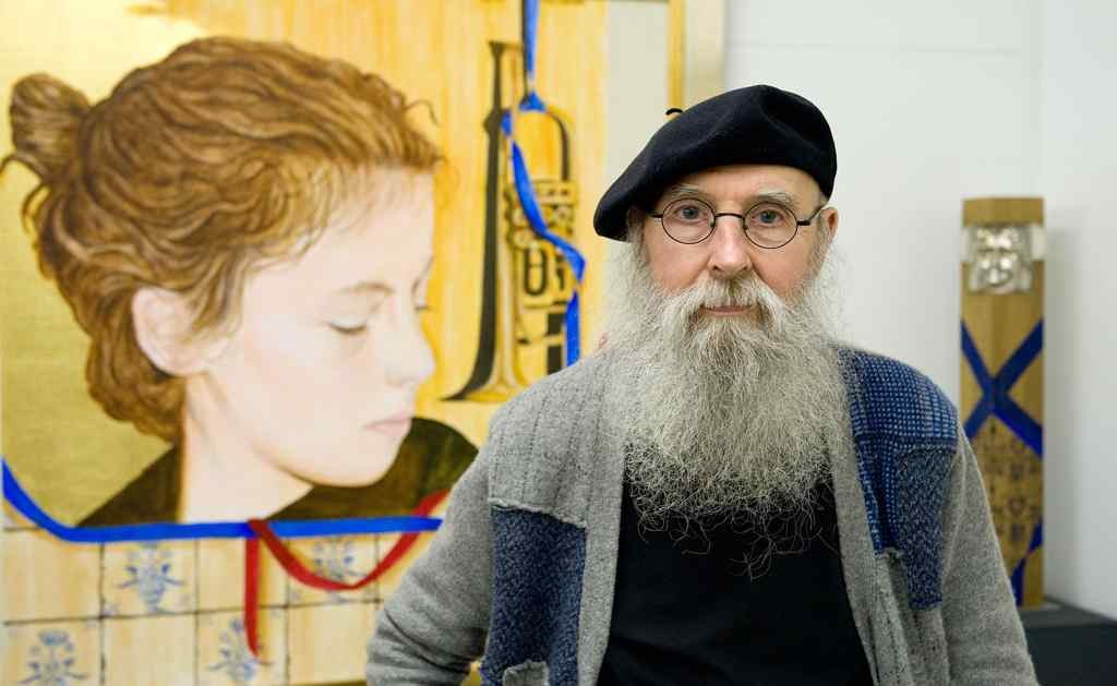 Erik Verberckt - Kunstenaar